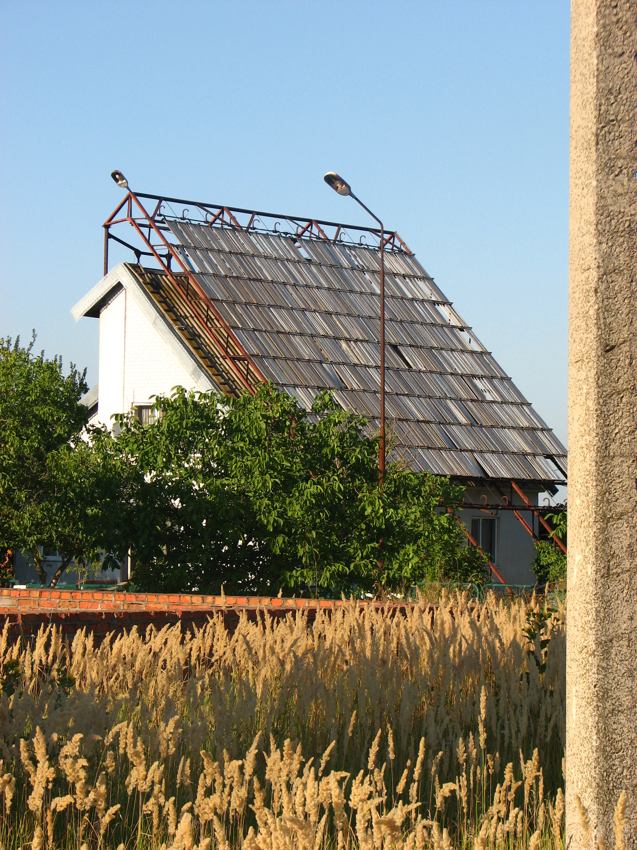 Дом с солнечными батареями в поселке Черноморском